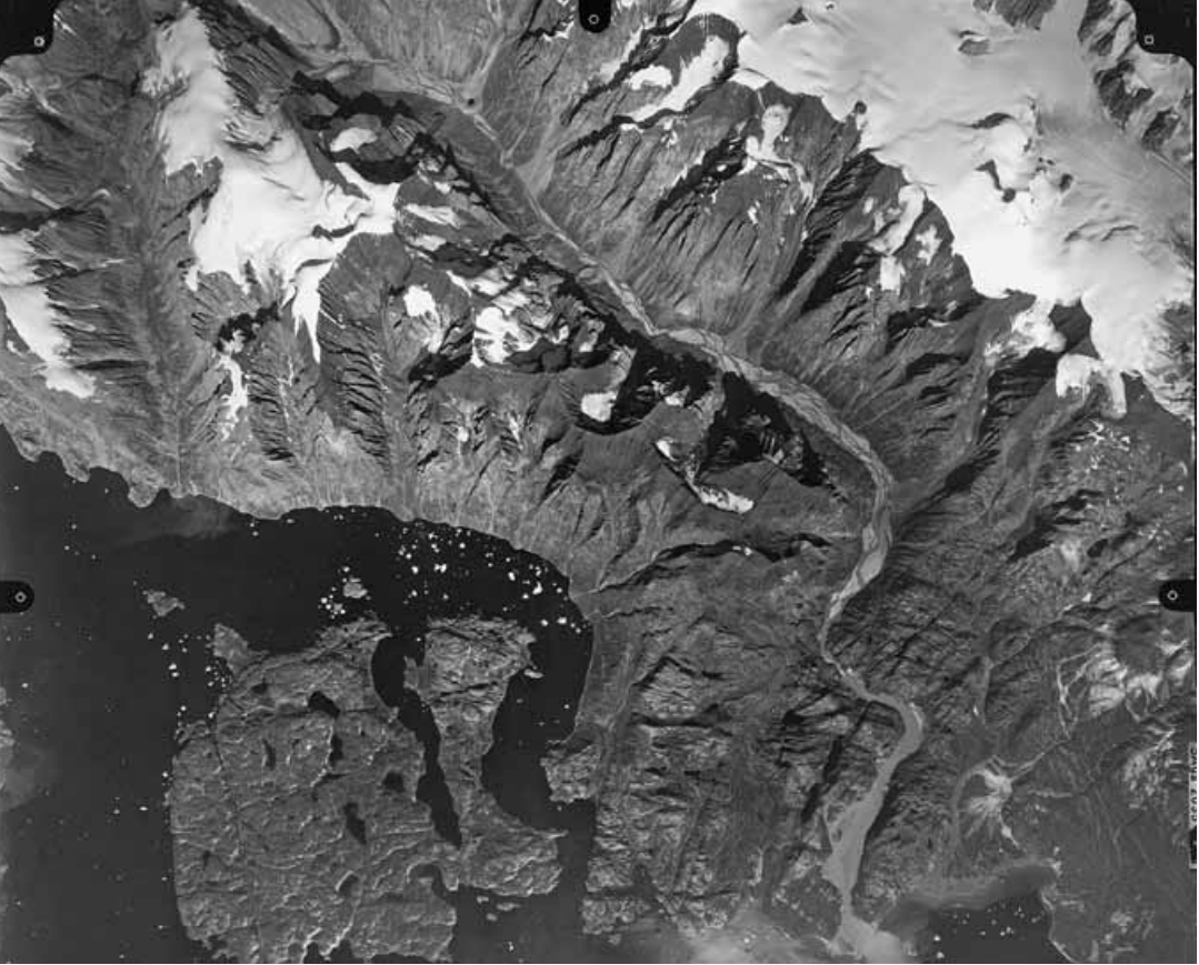 Ortofoto fra Grønland. Geodætisk Institut rute 878H, billede nr. 747. Milne Land med Danmarks Ø nederst tv